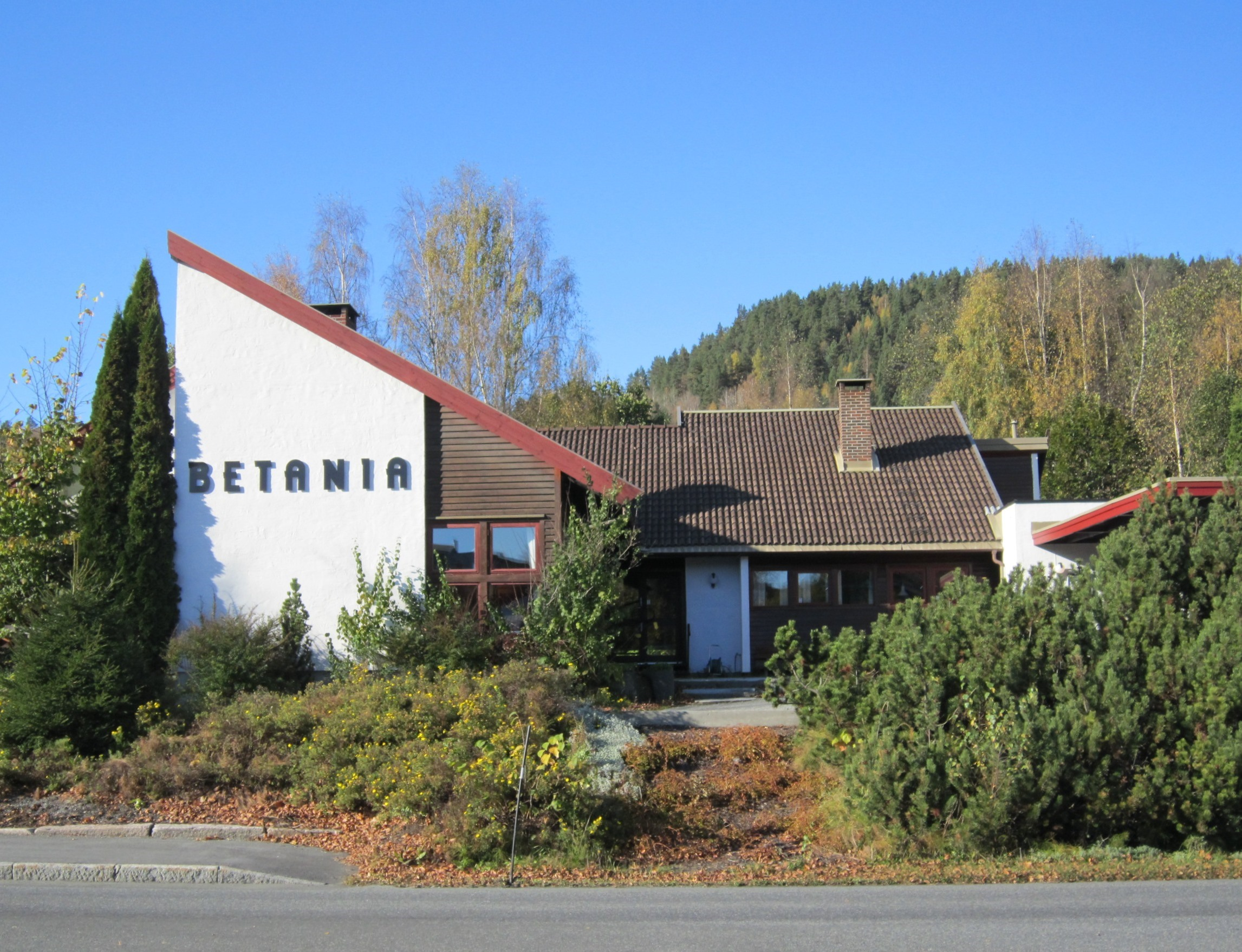 Pinsekirken Betania på Kongsberg